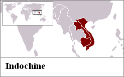 Localistaion de l'Indochine